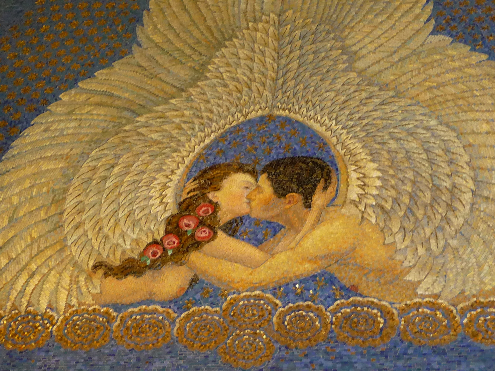 Der 48,5 Meter hohe Hochzeitsturm auf der Mathildenhöhe ist das Wahrzeichen der hessischen Stadt Darmstadt.